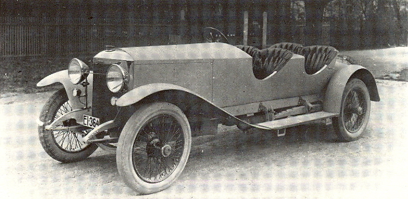 Austro-Daimler AD 6-17 Sports Car 4 seats (Body: Köllensberger) (1923)